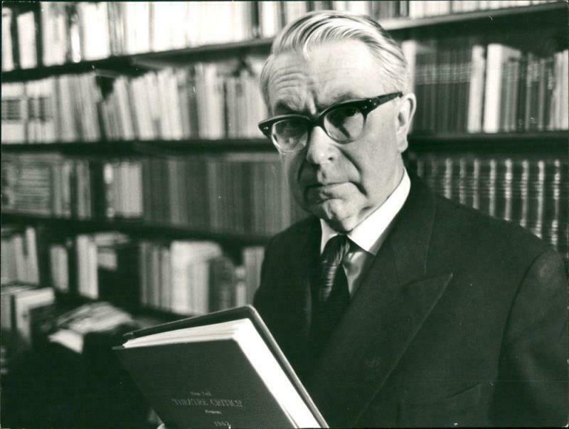 Foto på Stig Torsslow infört i Svenska Dagbladet 1965-01-22.